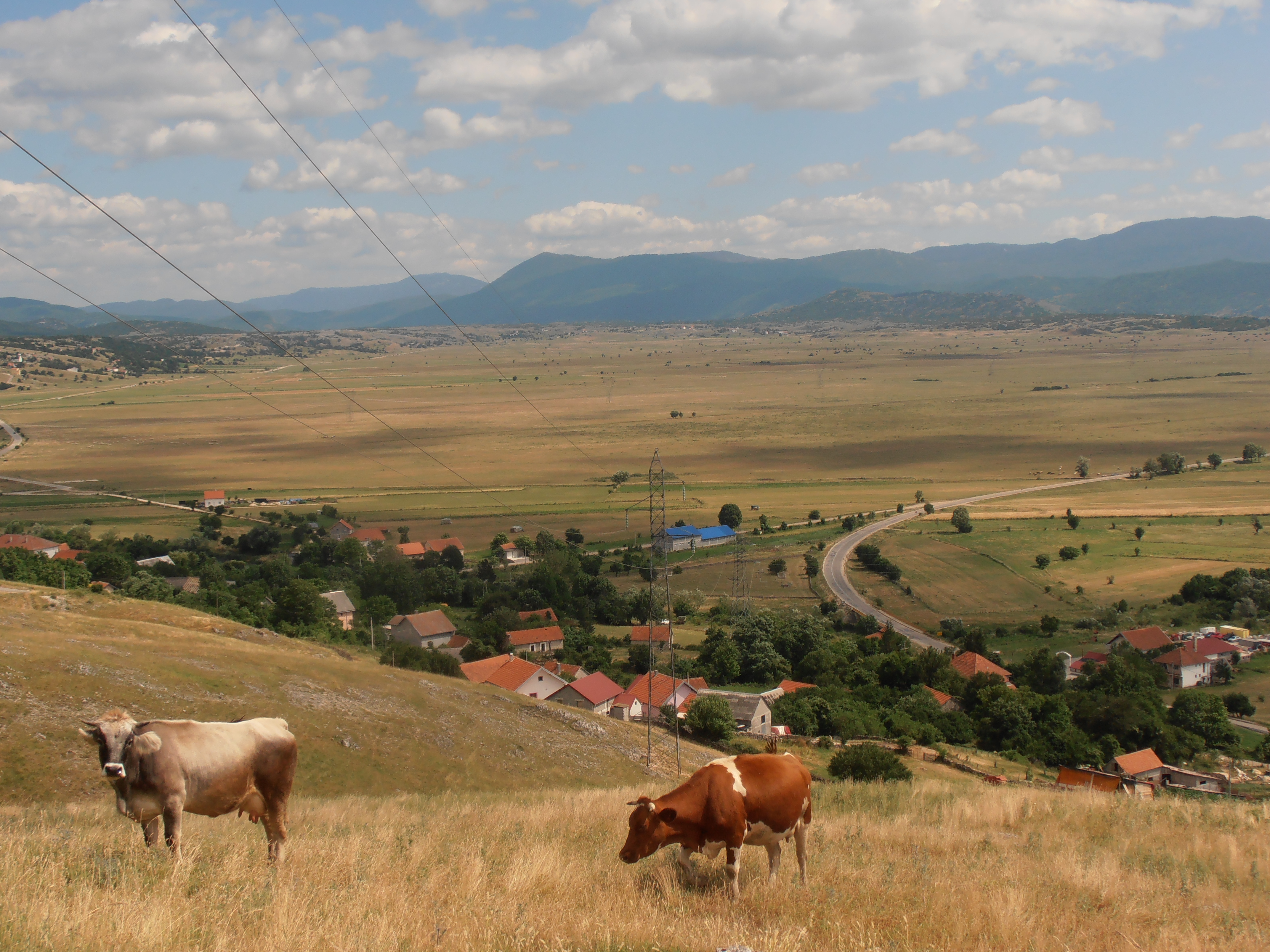 PUP015 Pogled sa Miholjača na Gatačko polje. Pole ispaše krave se same vraćaju na mjesto svog prenoćišta.